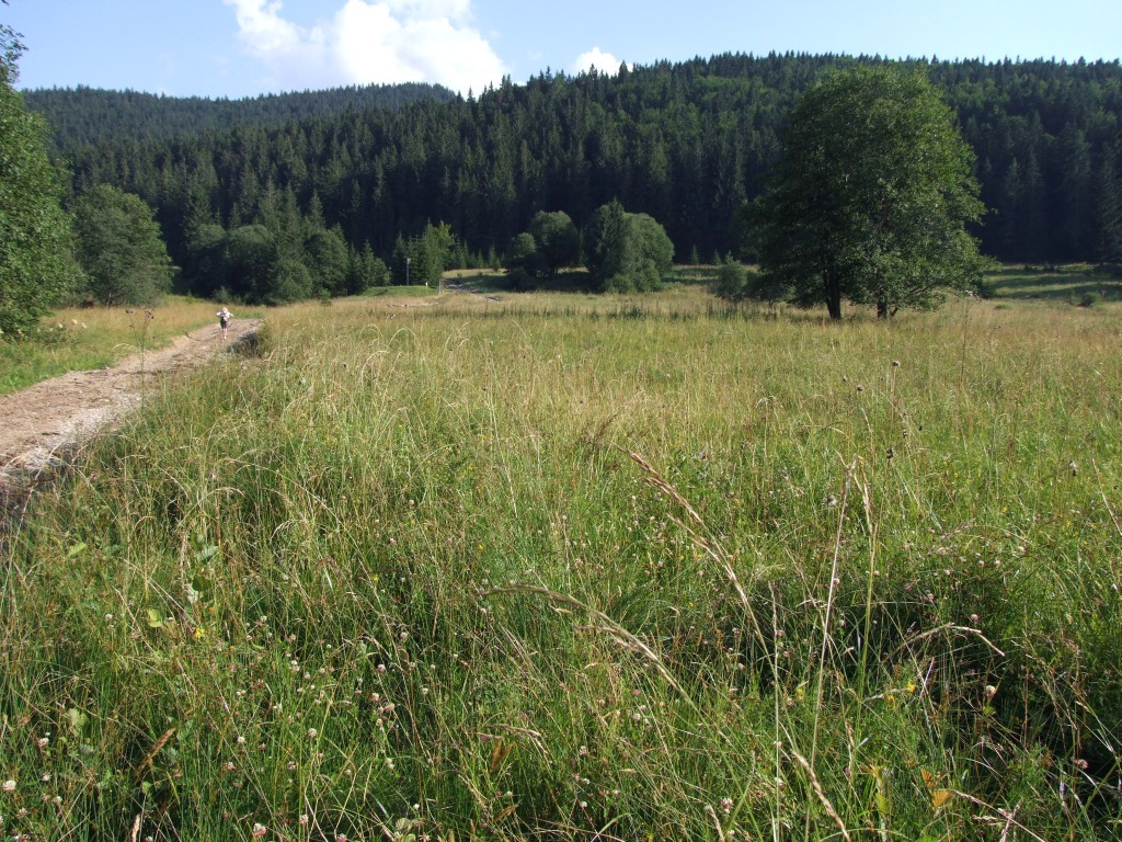 Czymchowska Polana na Cichej Dolinie Orawskiej